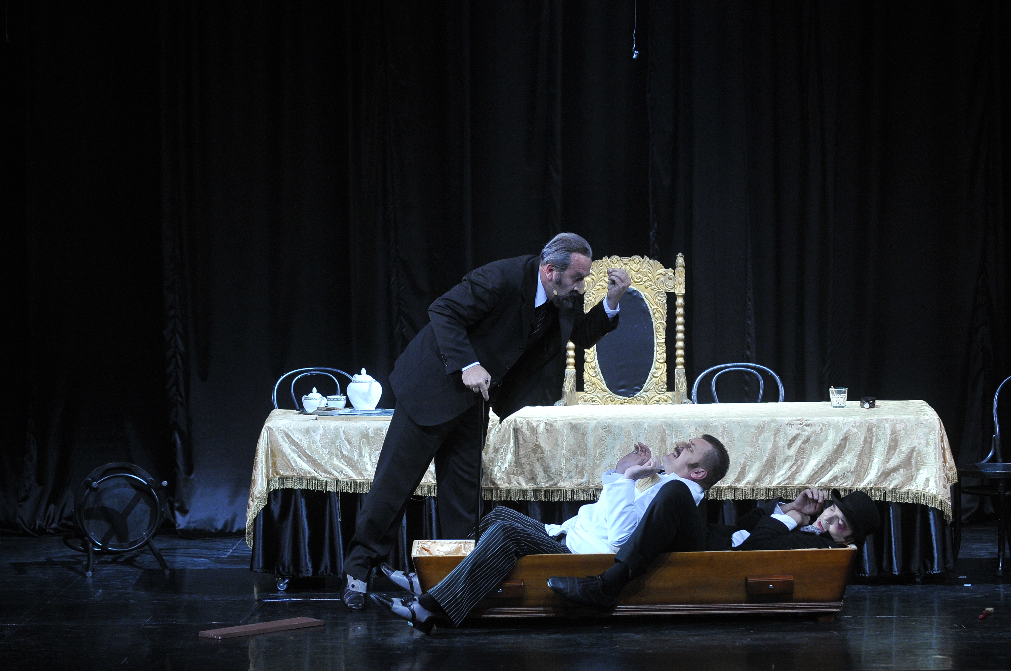 Premijera predstave "Maratonci trče počasni krug"